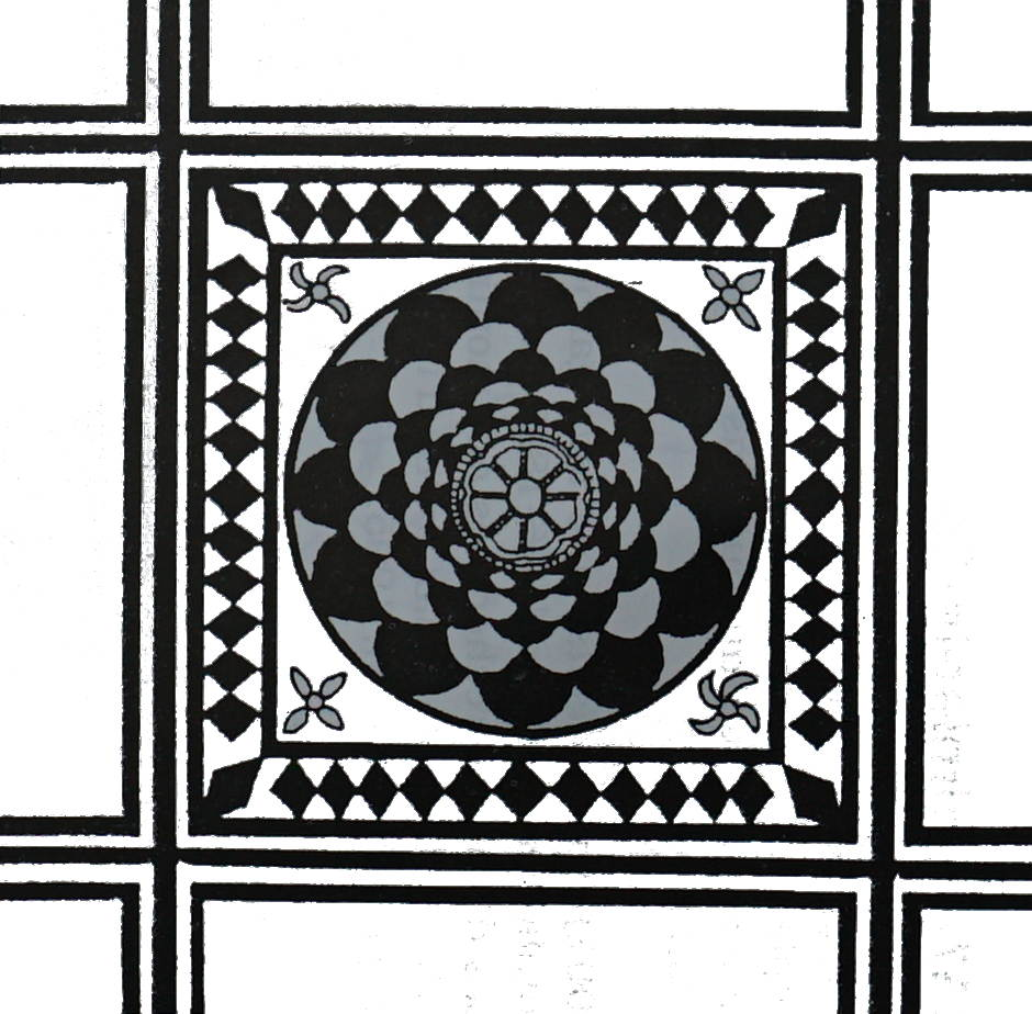 vue de cf. titre